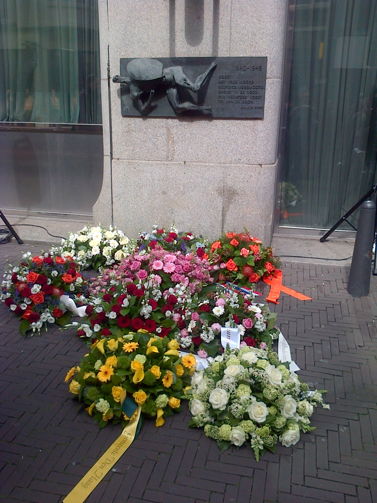 Kransen bij monument Nieuwspoort